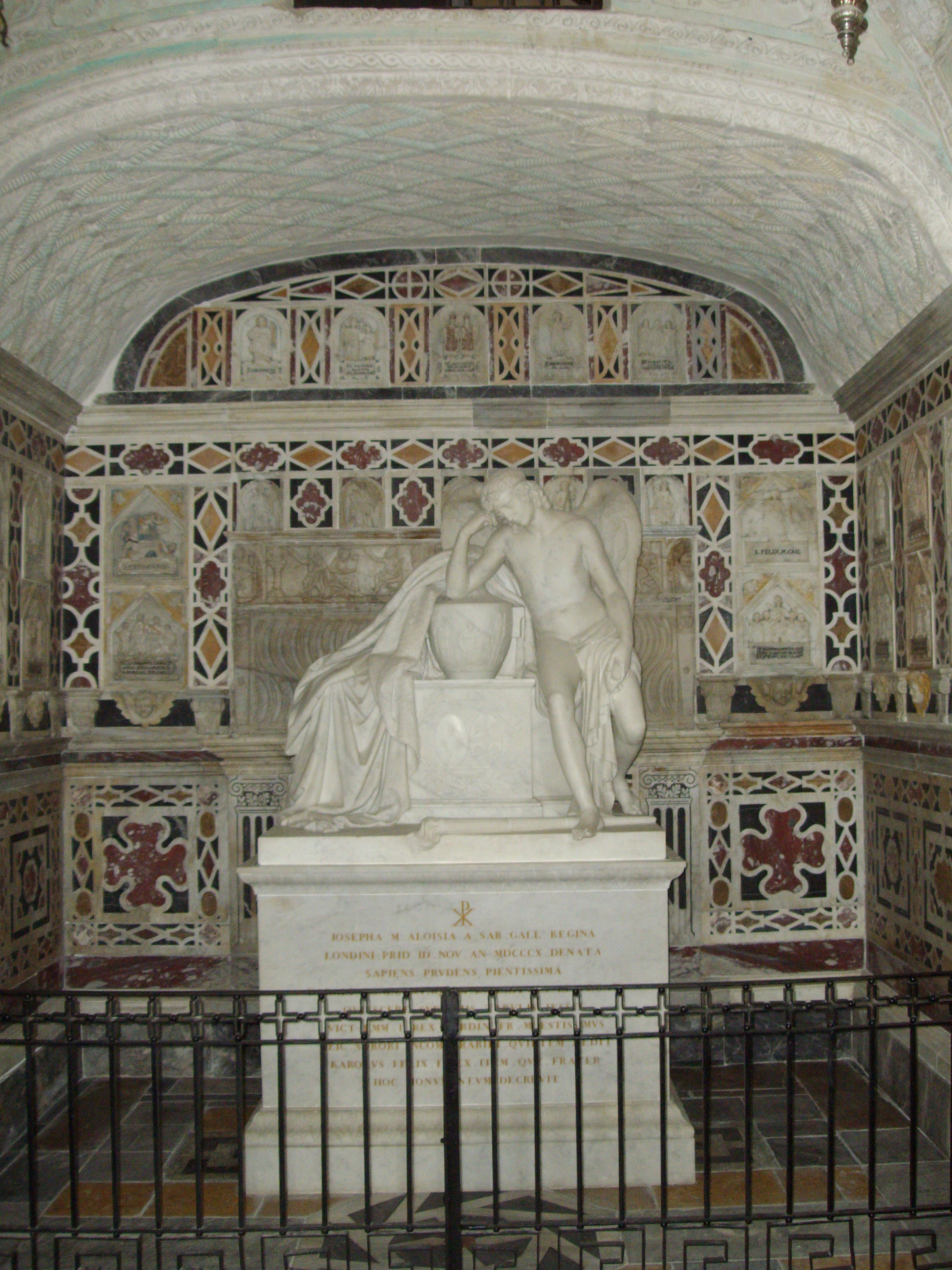 Cappella di San Lucifero e mausoleo di Giuseppa Maria Luigia di Savoia nel Santuario dei Martiri, Cattedrale di Cagliari